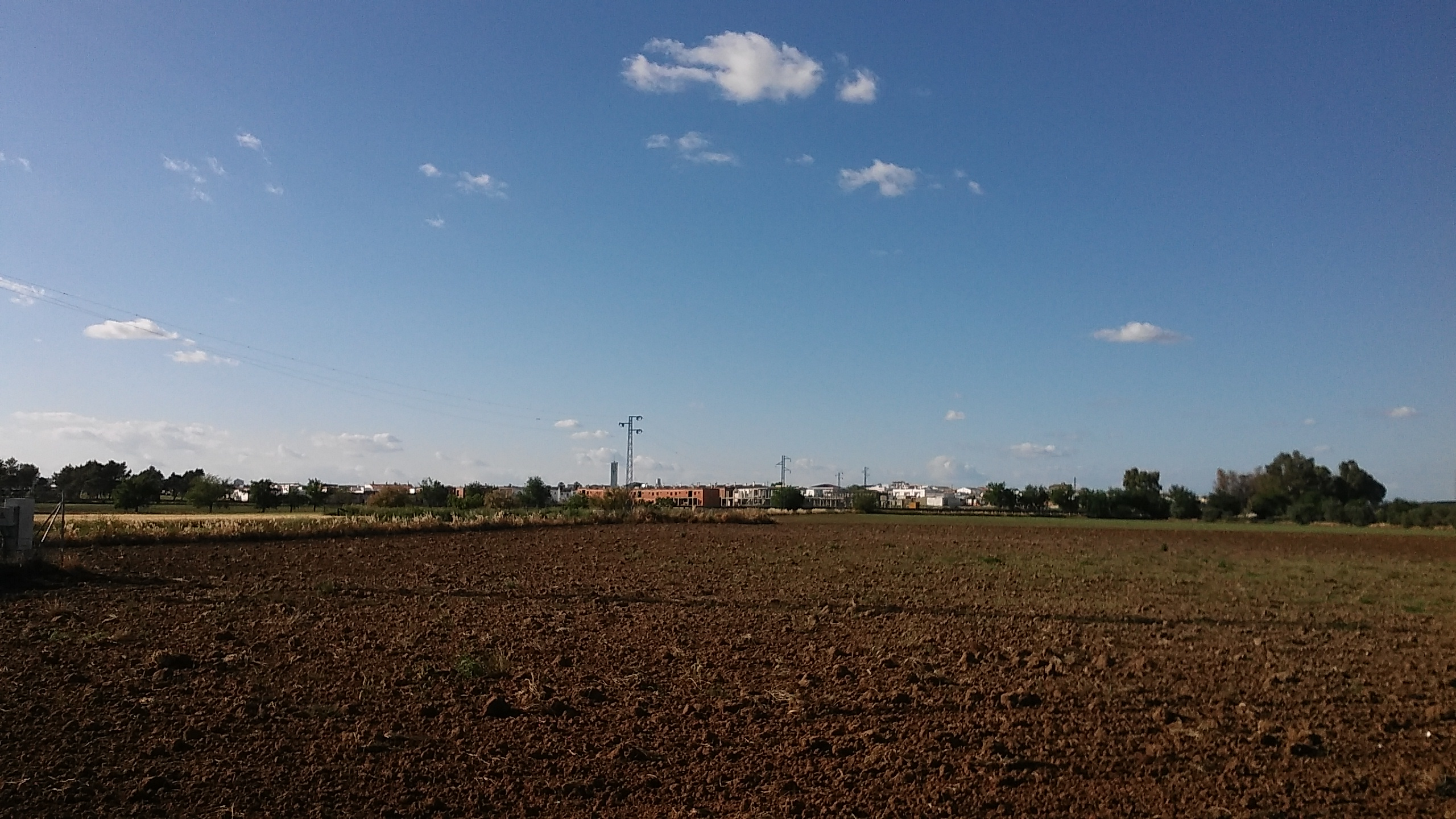 El Coto de Bornos desde gasolinera BP